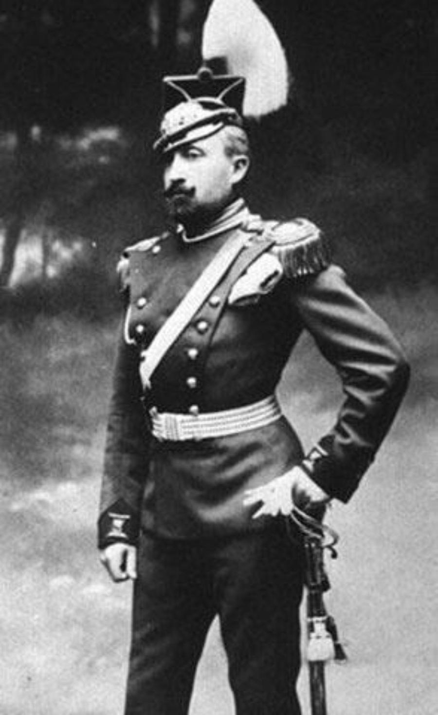 Louis Bonaparte (1864–1932)